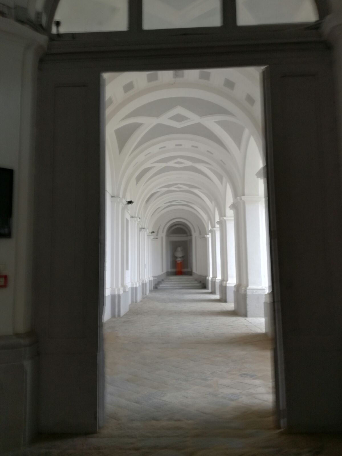 Ingresso del Nifo